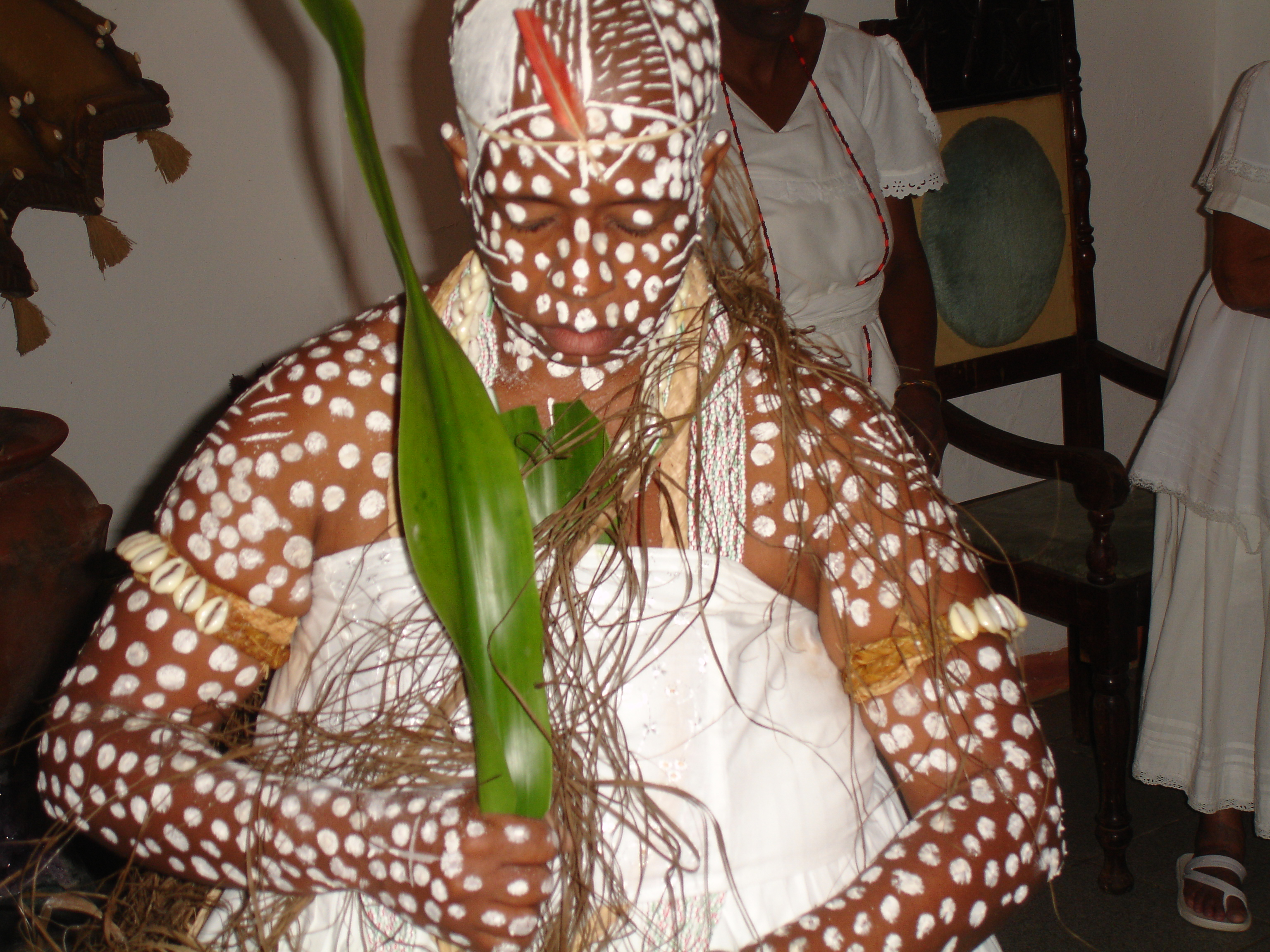 Iniciação é um rito de passagem no Candomblé, Bahia, Brasil